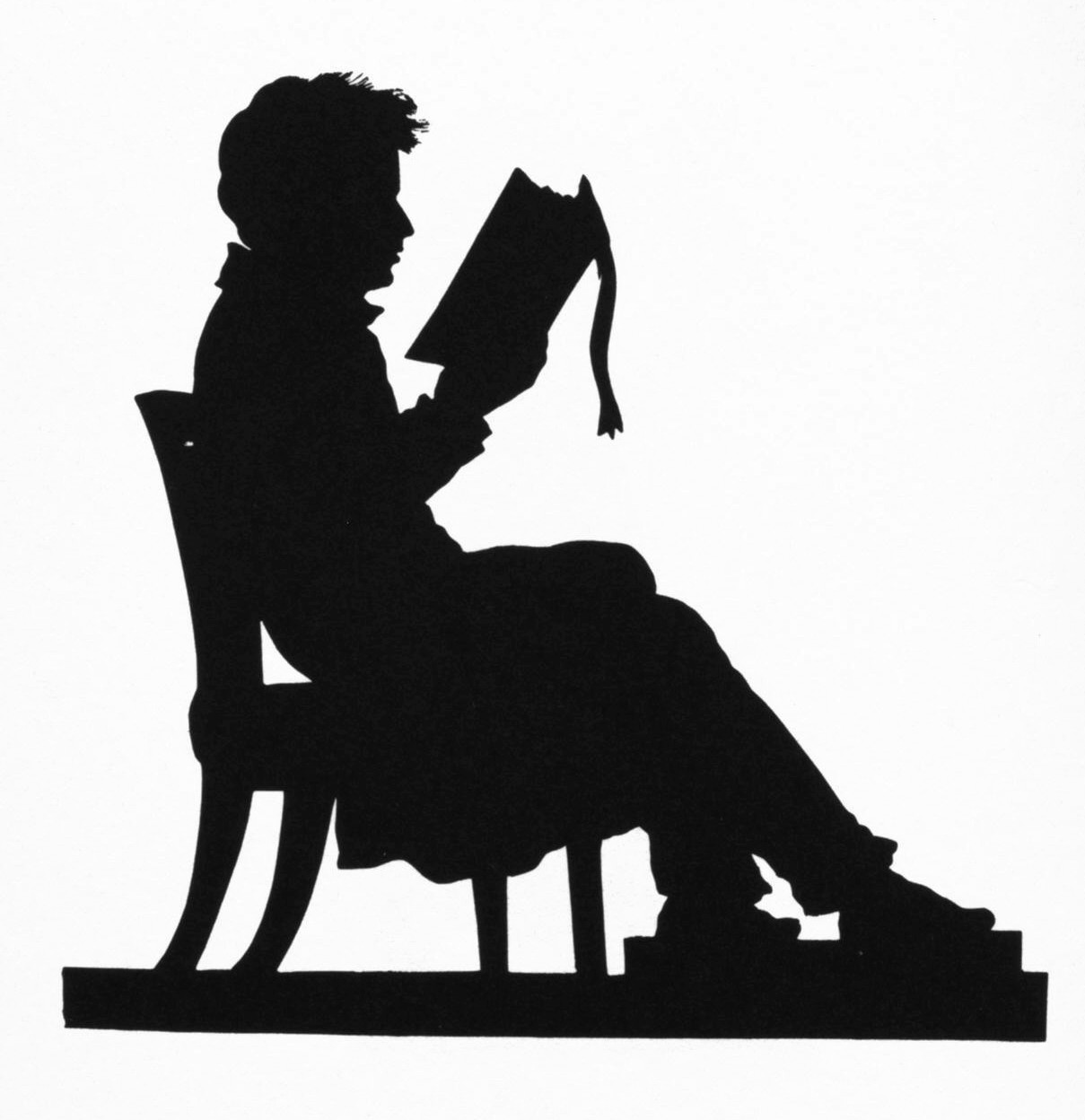 Luise Duttenhofer: Ludwig Tieck, sitzend und lesend, schwarzer Scherenschnitt, 10,5 x 10,2 cm, Entstehungsjahr 1817-1828 (Tieck besuchte Stuttgart 1817 und 1828), Marbach, Deutsches Literaturarchiv, Inventarnummer 5486.